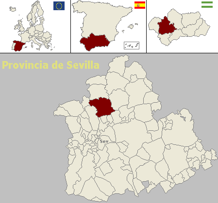 Mapa de localización del municipio sevillano de Castilblanco de los Arroyos (Andalucía, España)